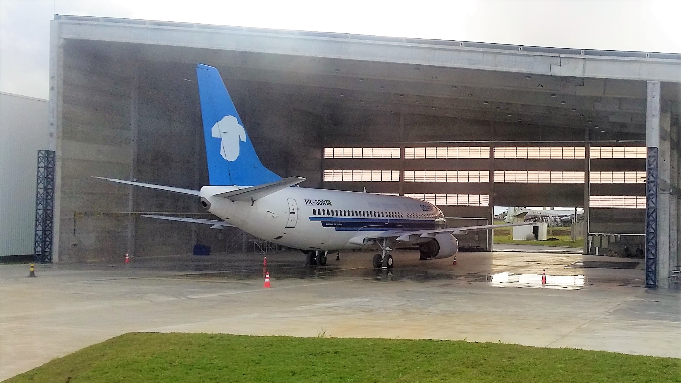 Avião Boing B737 da SIDERAL PR-SDW no Aeroporto Internacional de São José dos Pinhais-PR